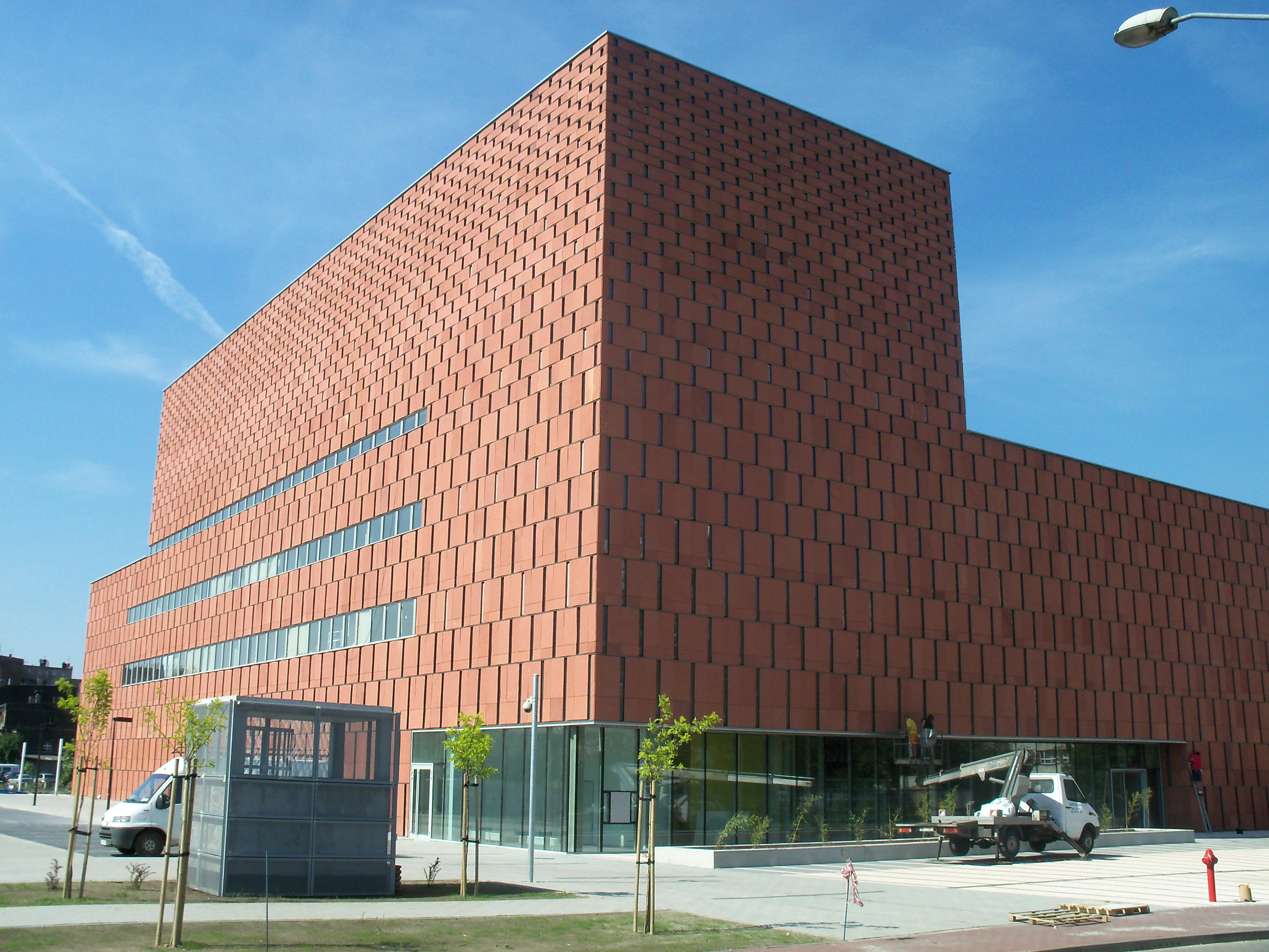 Centrum Informacji Naukowej i Biblioteka Akademicka w Katowicach